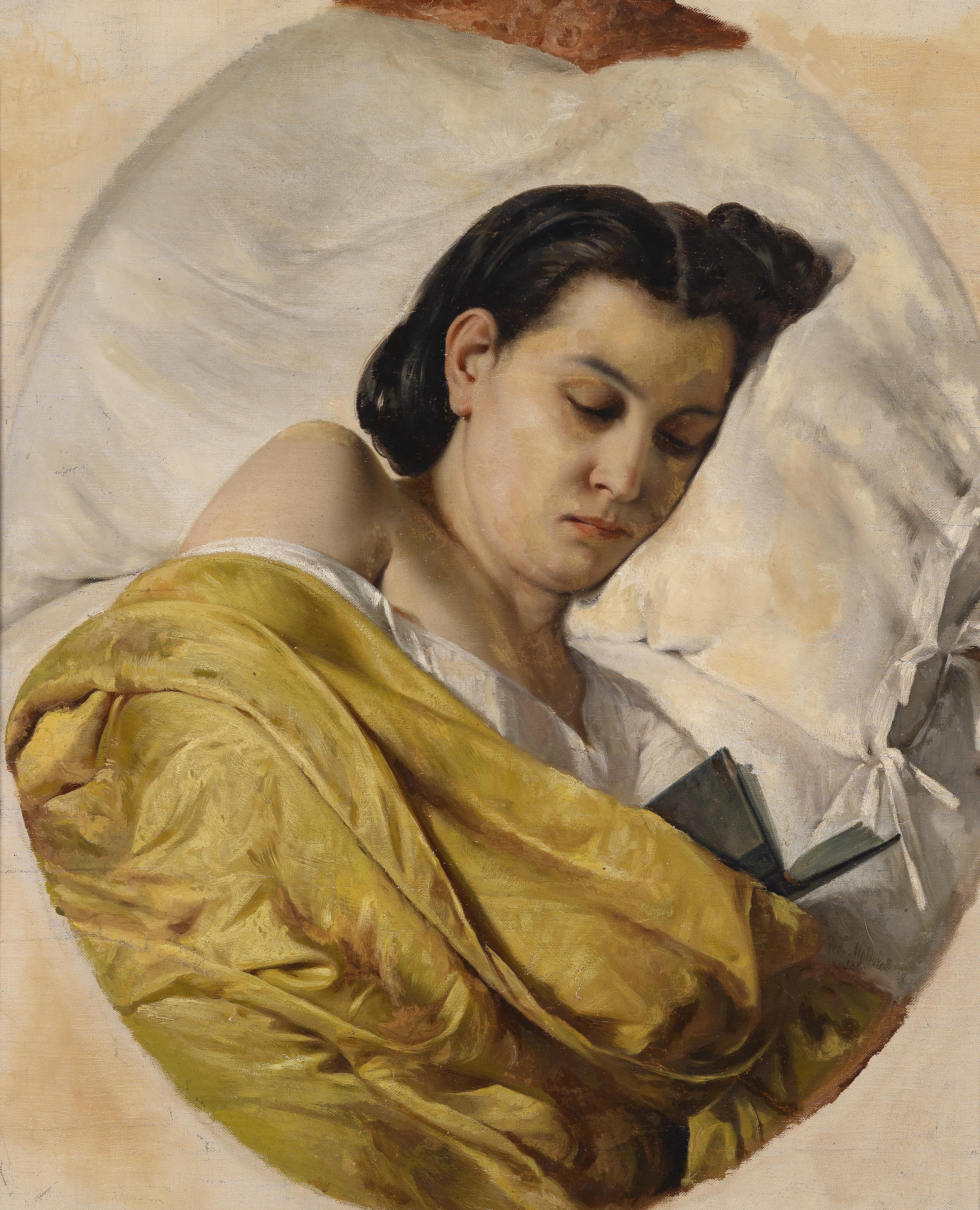 Schlafende